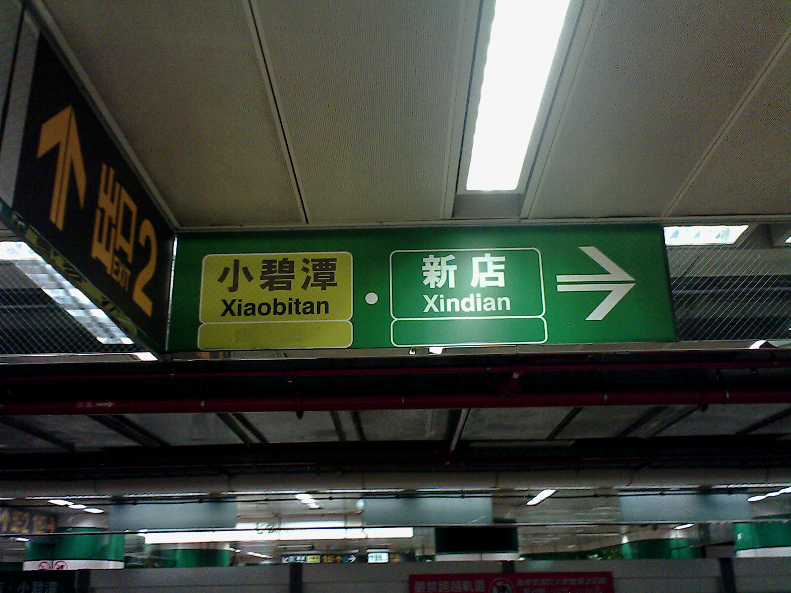 臺北捷運新店線七張站第二月臺。